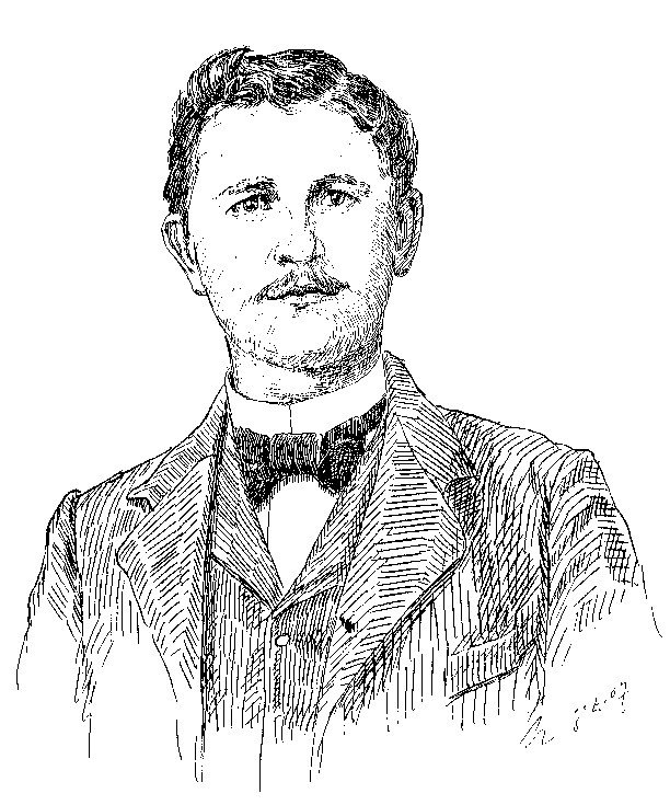 Selbstportrait von Carl Oberbach, Grevenbroich